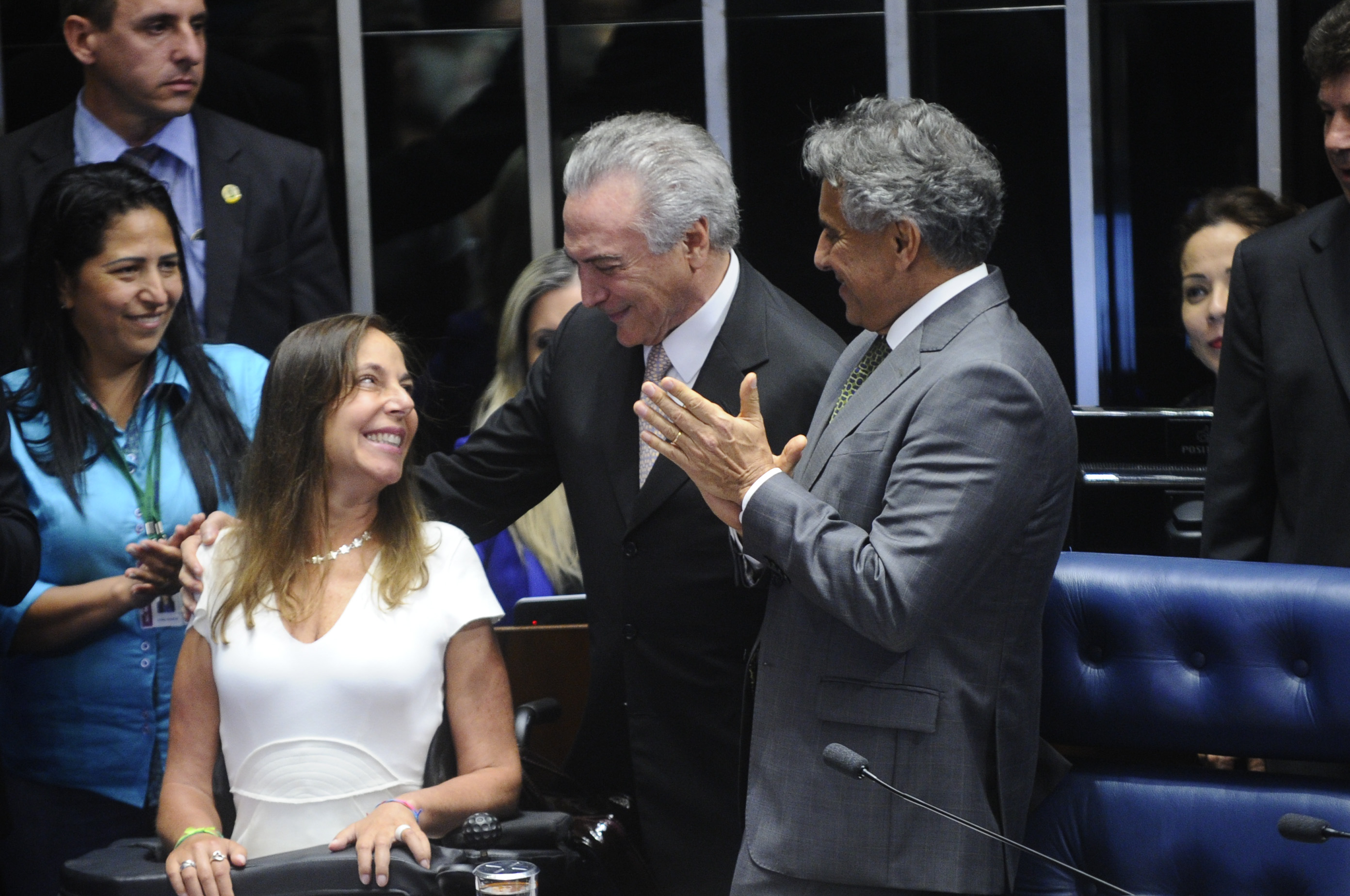 Plenário do Senado durante sessão solene do Congresso Nacional destinada à posse do Excelentíssimo Senhor Michel Temer como Presidente da República. Presidente da República Michel Temer cumprimenta a terceira-secretaria da Mesa Diretora do Congresso Nacional, deputada Mara Gabrilli (PSDB-SP). Foto: Marcos Oliveira/Agência Senado